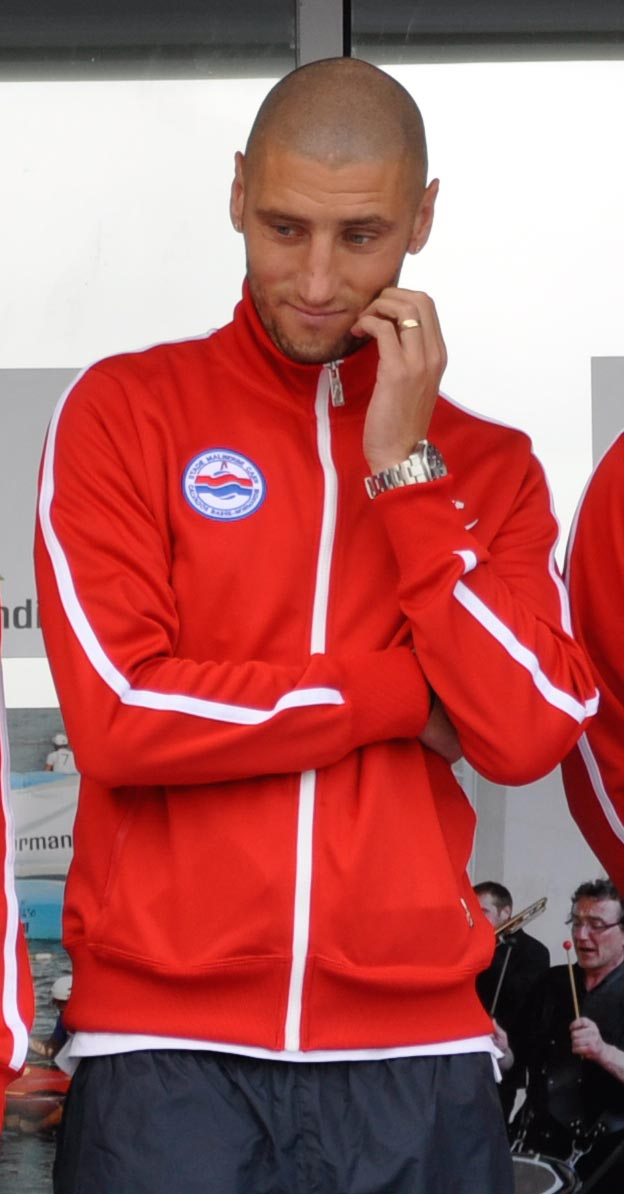 Laurent Agouazi lors de la présentation des recrues de Caen.